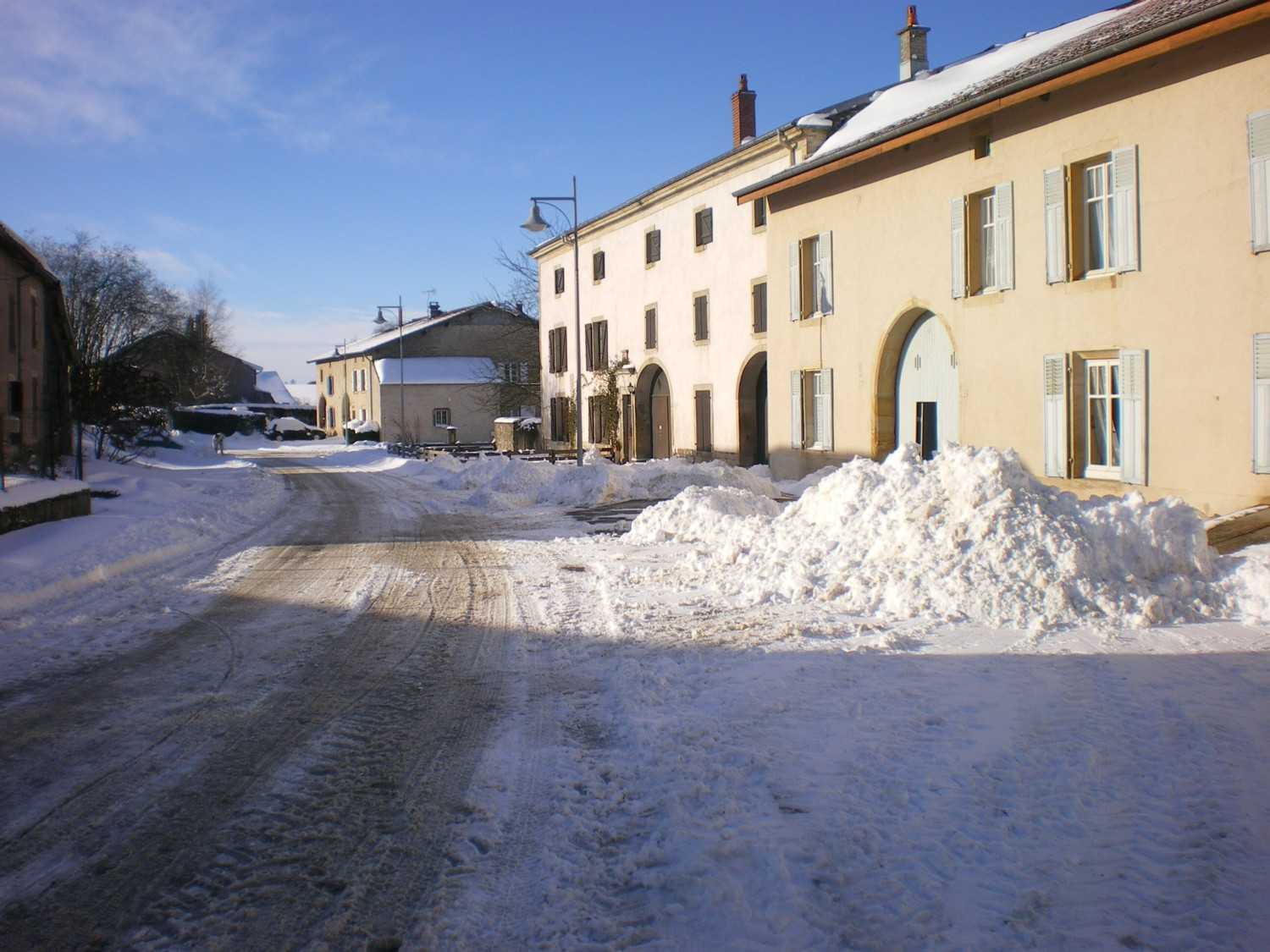 Village de Dignonville - Une rue sous la neige